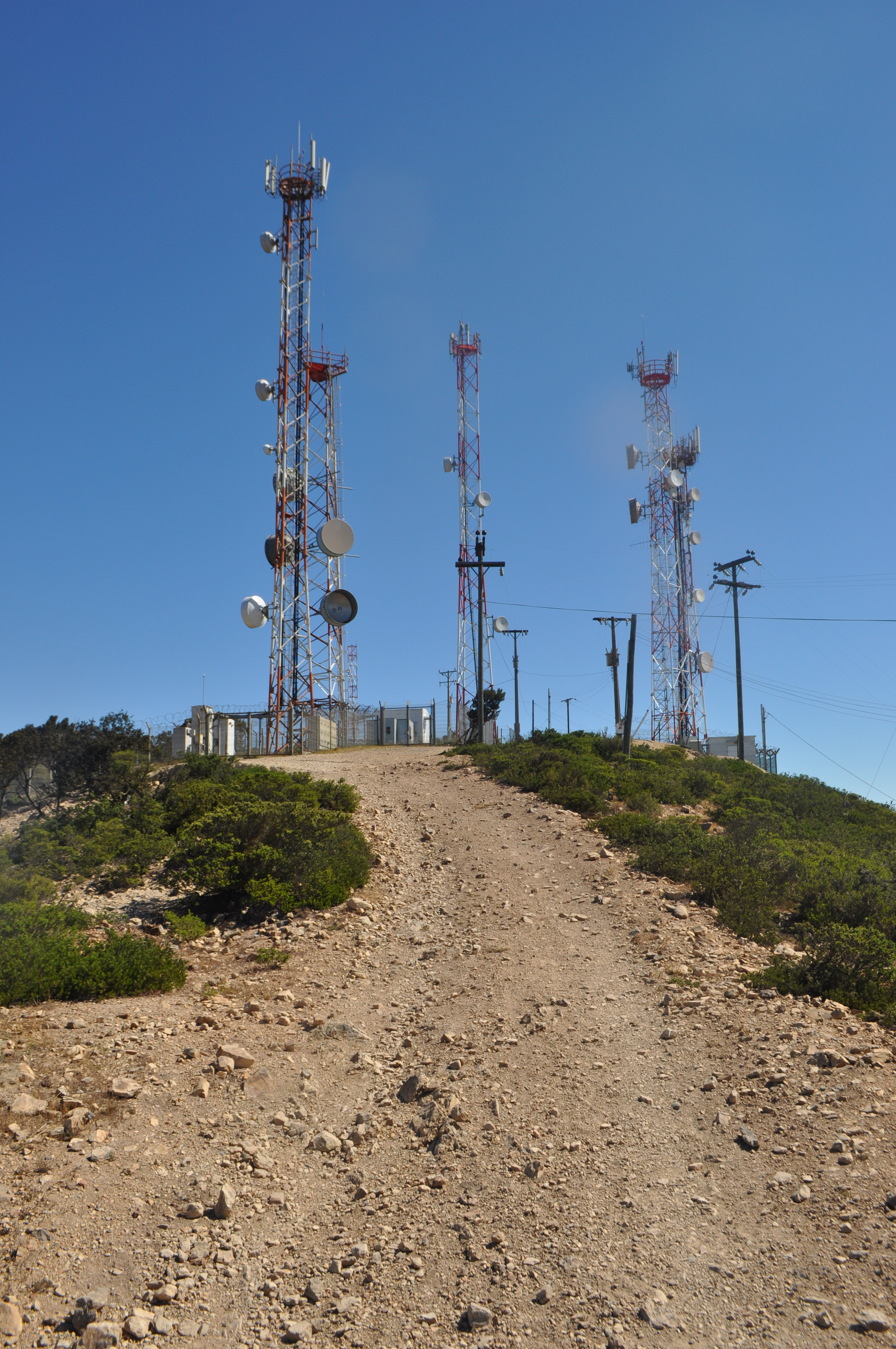 Torres de telecomunicaciones (telefonía celular) en la cumbre del Cerro Santa Inés.